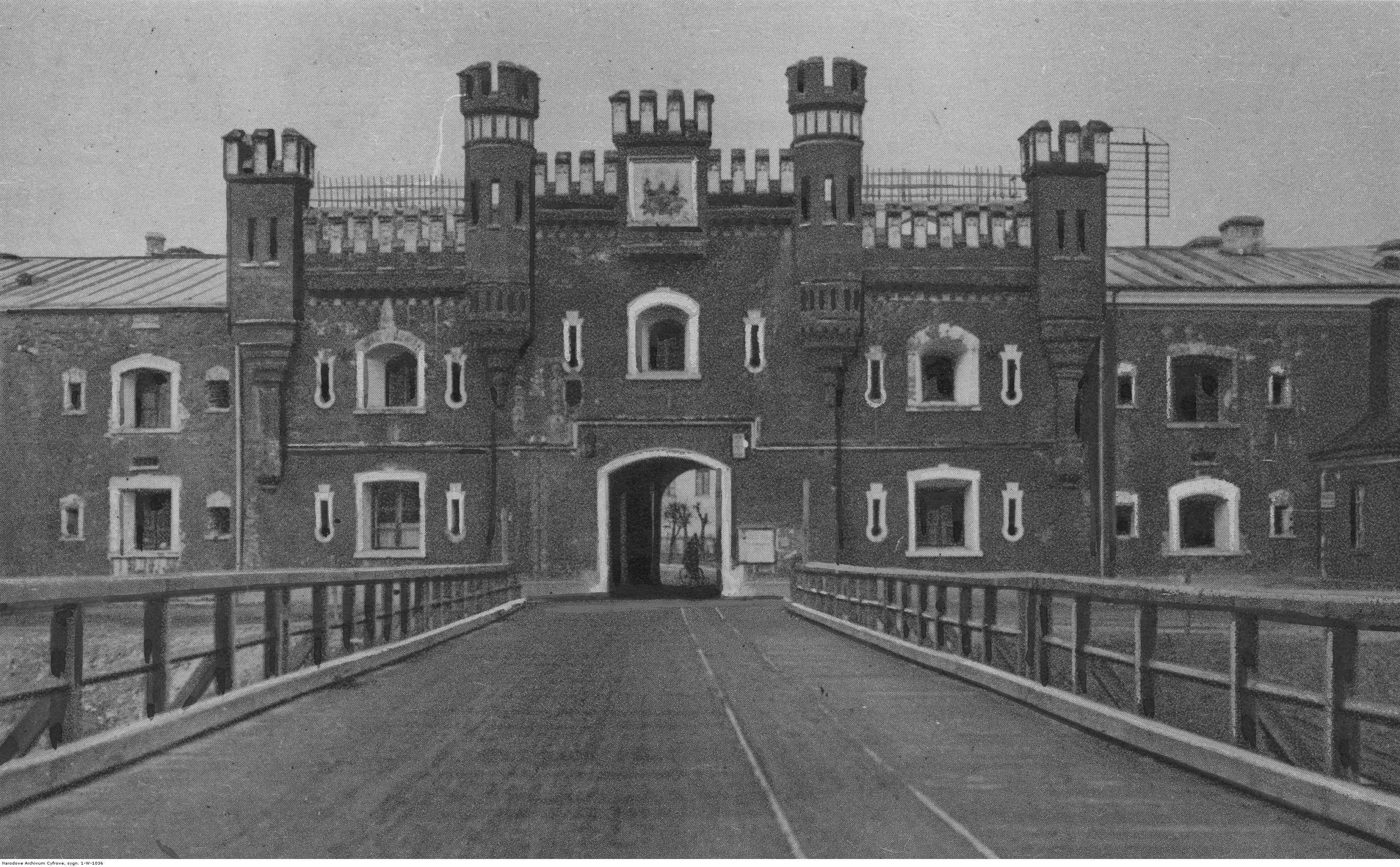 Brześć nad Bugiem - brama wjazdowa fortu. Koncern Ilustrowany Kurier Codzienny - Archiwum Ilustracji. Sygnatura: 1-W-1036